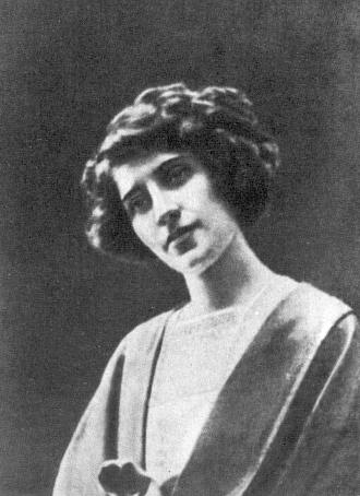 Наталья Николаевна Волохова (1878—1966)— русская, советская актриса.